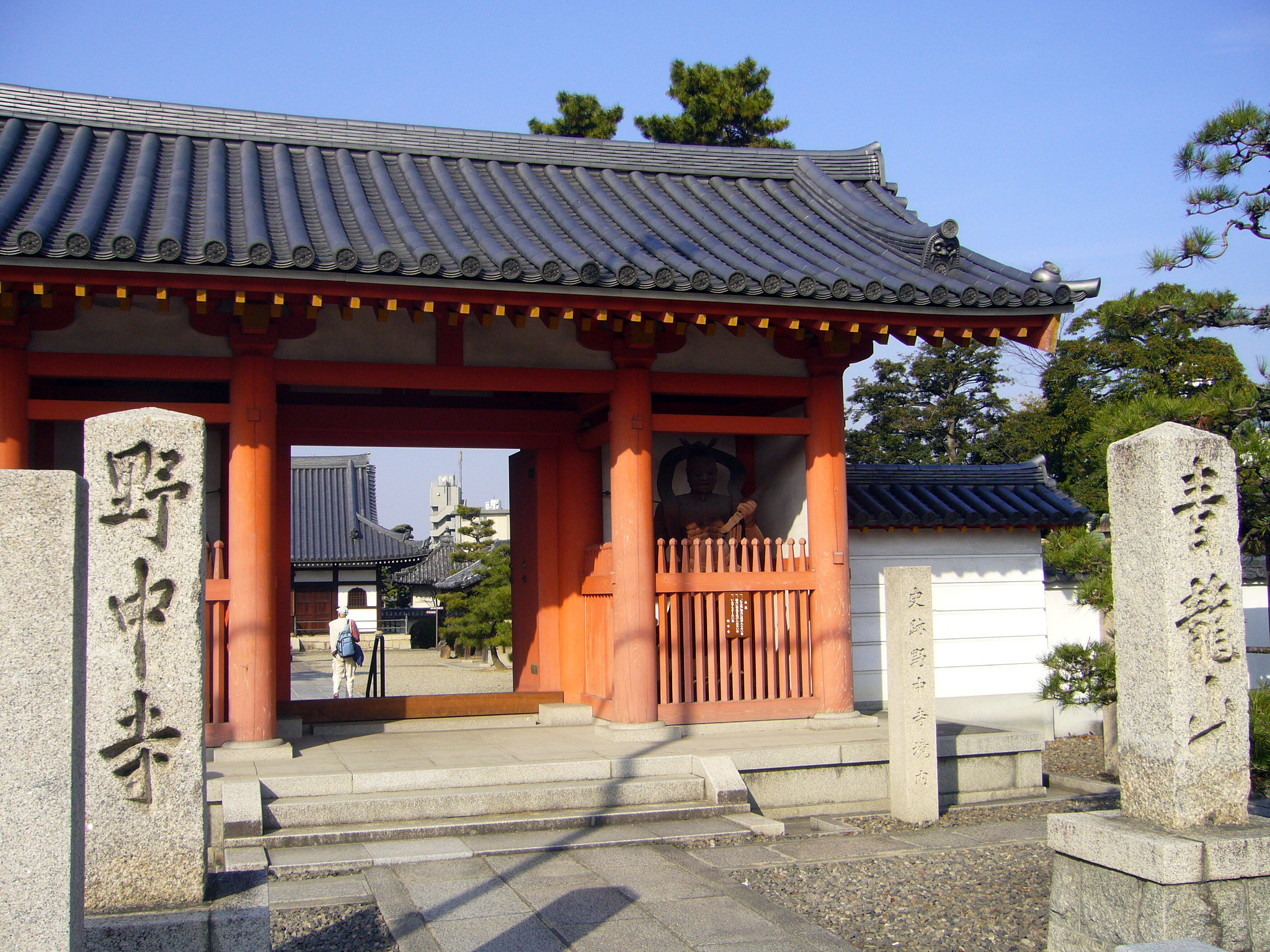 Yachuji in Habikino, Osaka, Japan